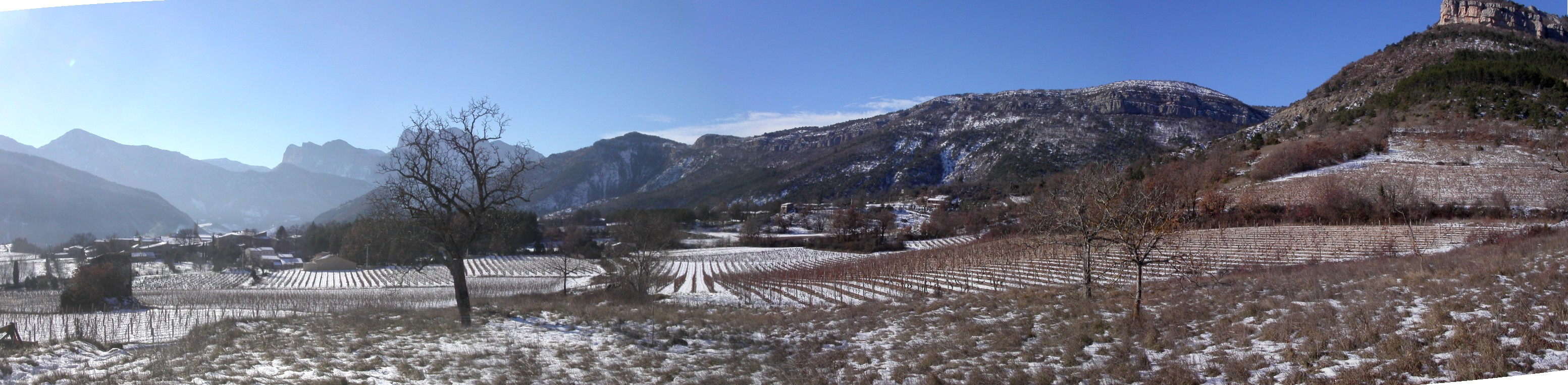 Panorama depuis le chemin du Raillet (Sud) Position : 44.714995,5.251379 Auteur : Utilisateur:Donsez